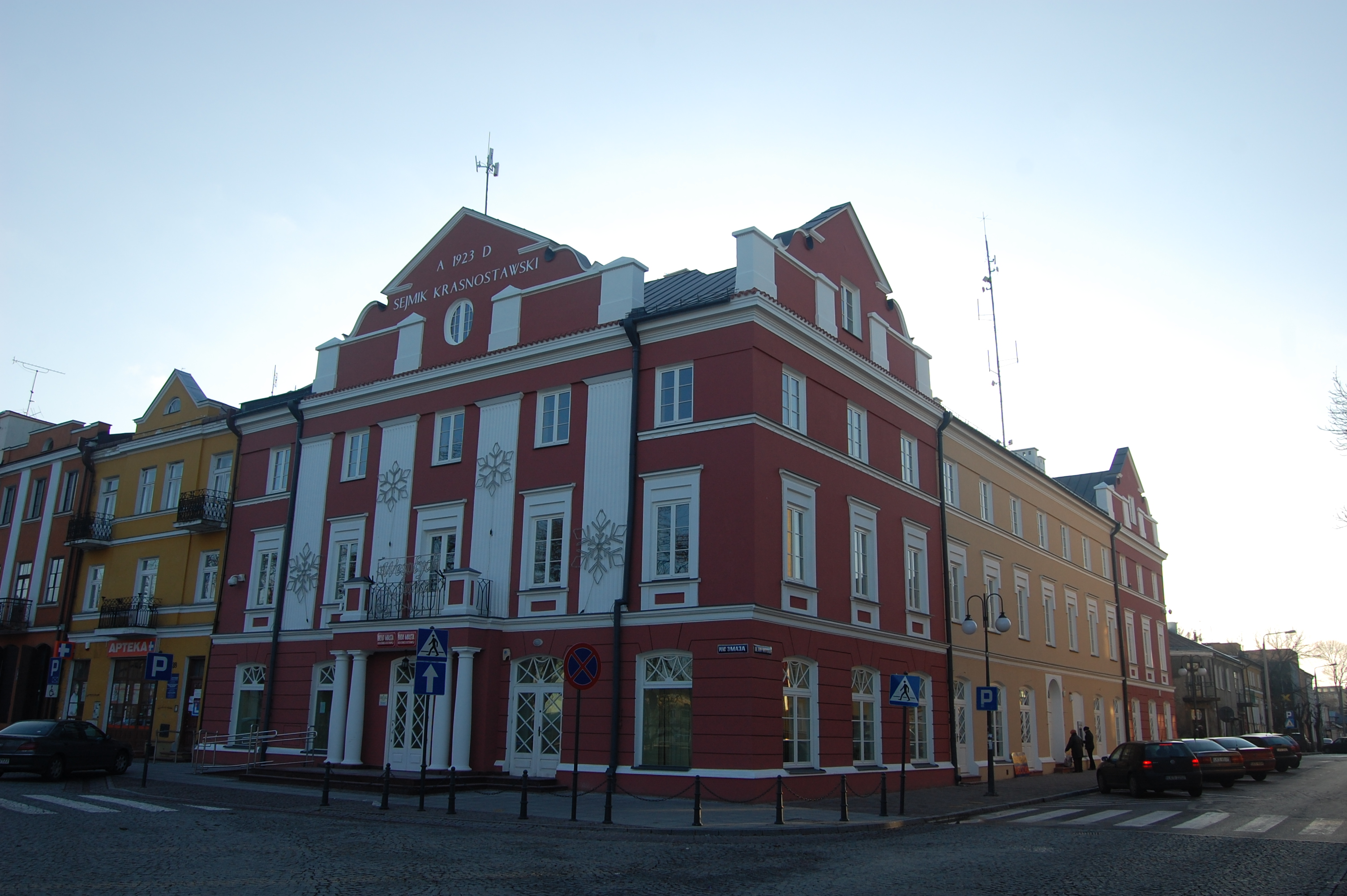 Krasnystaw - rynek.